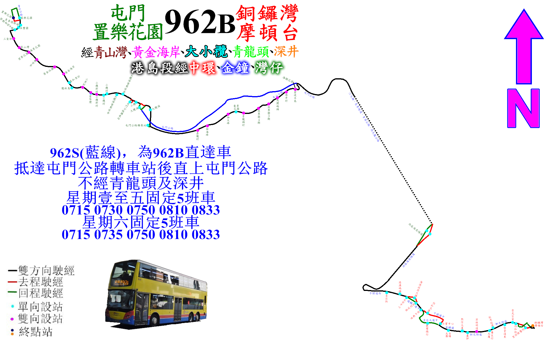 中文（香港）: 過海隧巴962B線走線圖